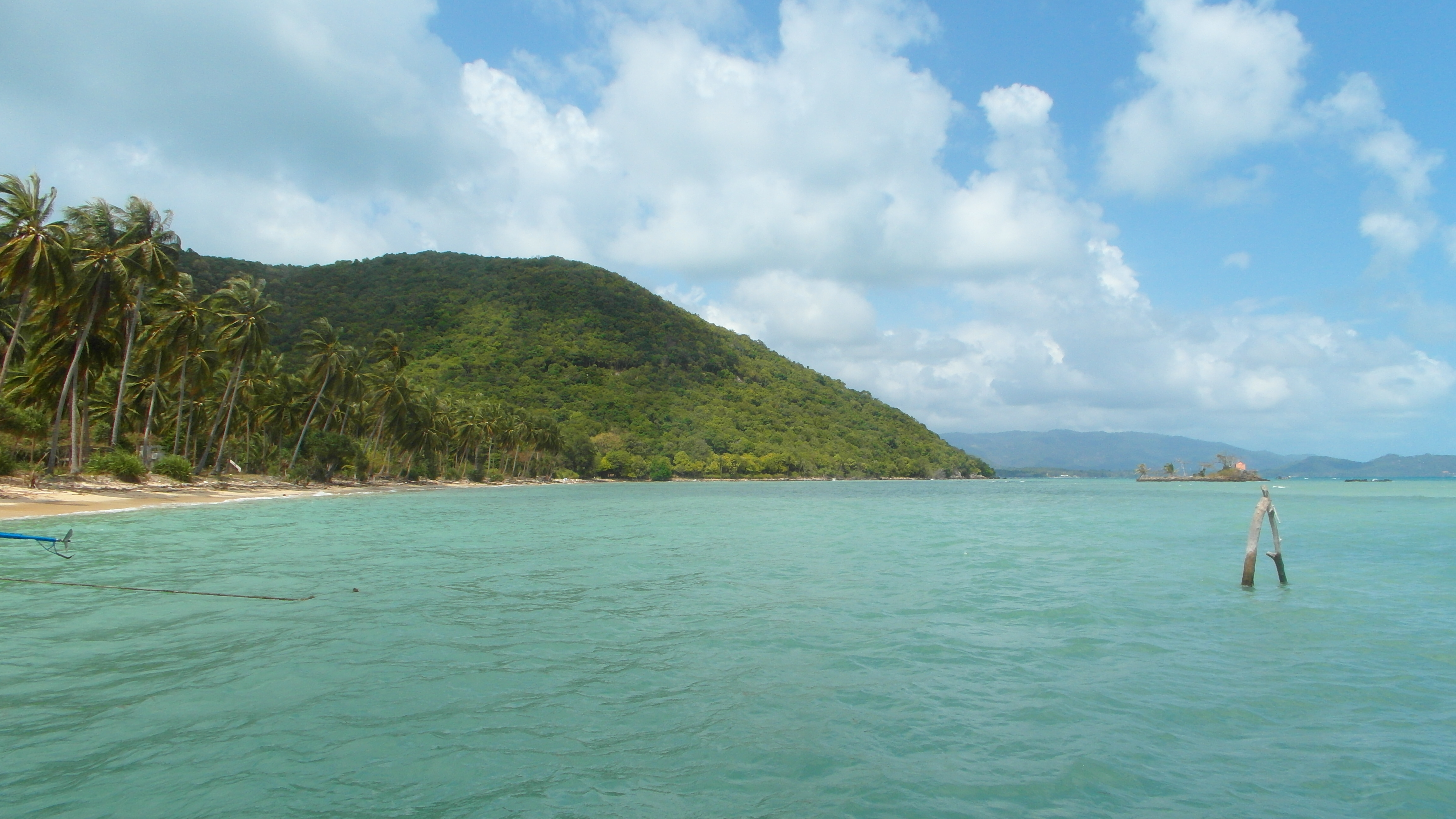 Ko Tan, Samui, 2014, february